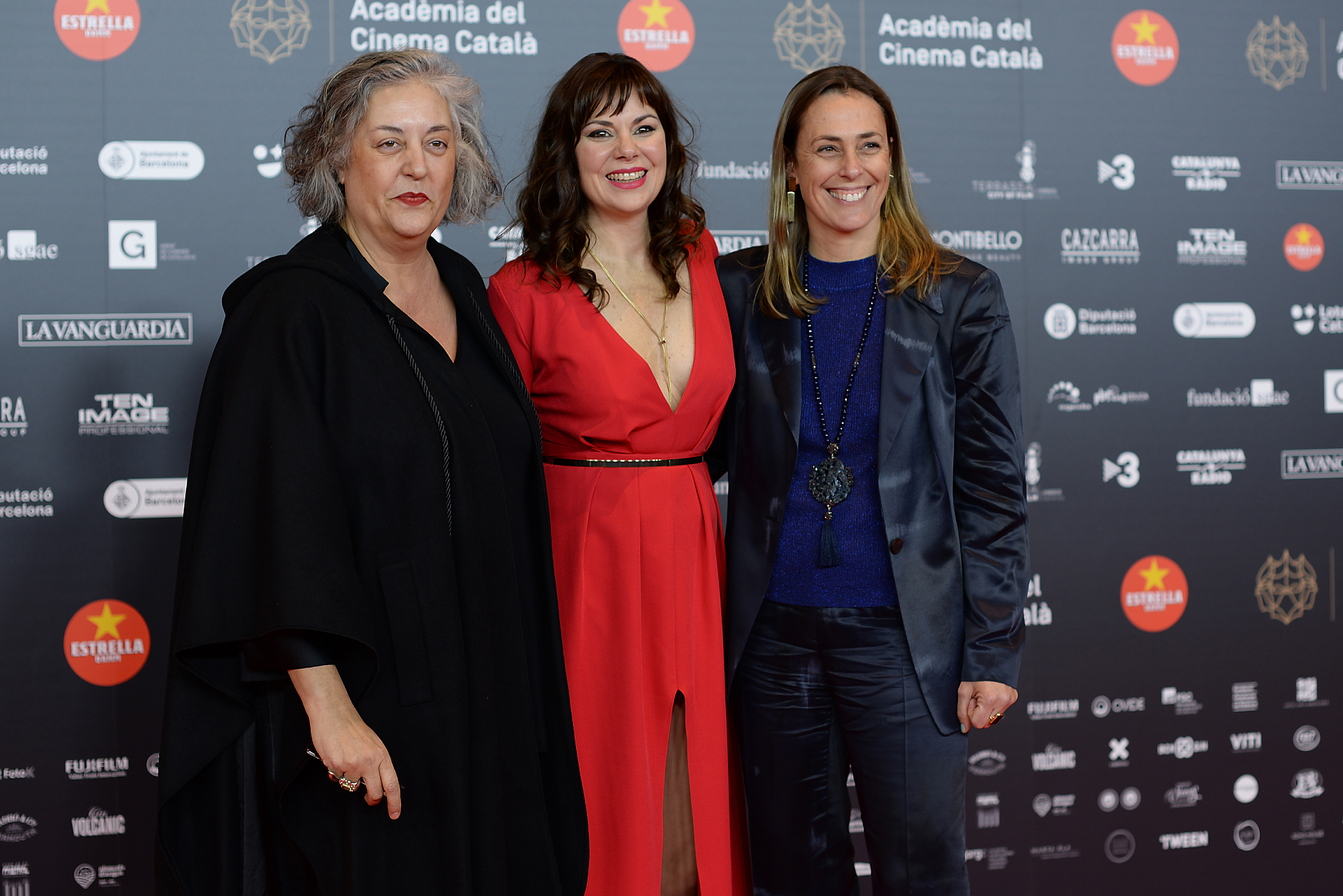 Mercè Paloma, vestuari; Montse Sanfeliu, maquillatge i perruqueria, i Sylvia Steinbrecht, directora artística (Elisa y Marcela), XII Premis Gaudí (2020)